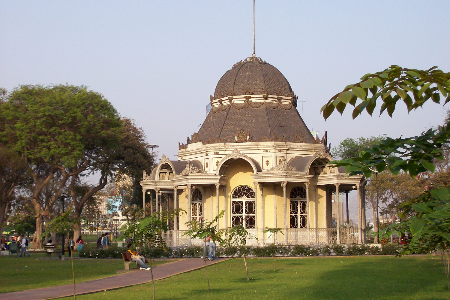 pabellón bizantino del parque de la exposición, Lima, Perú